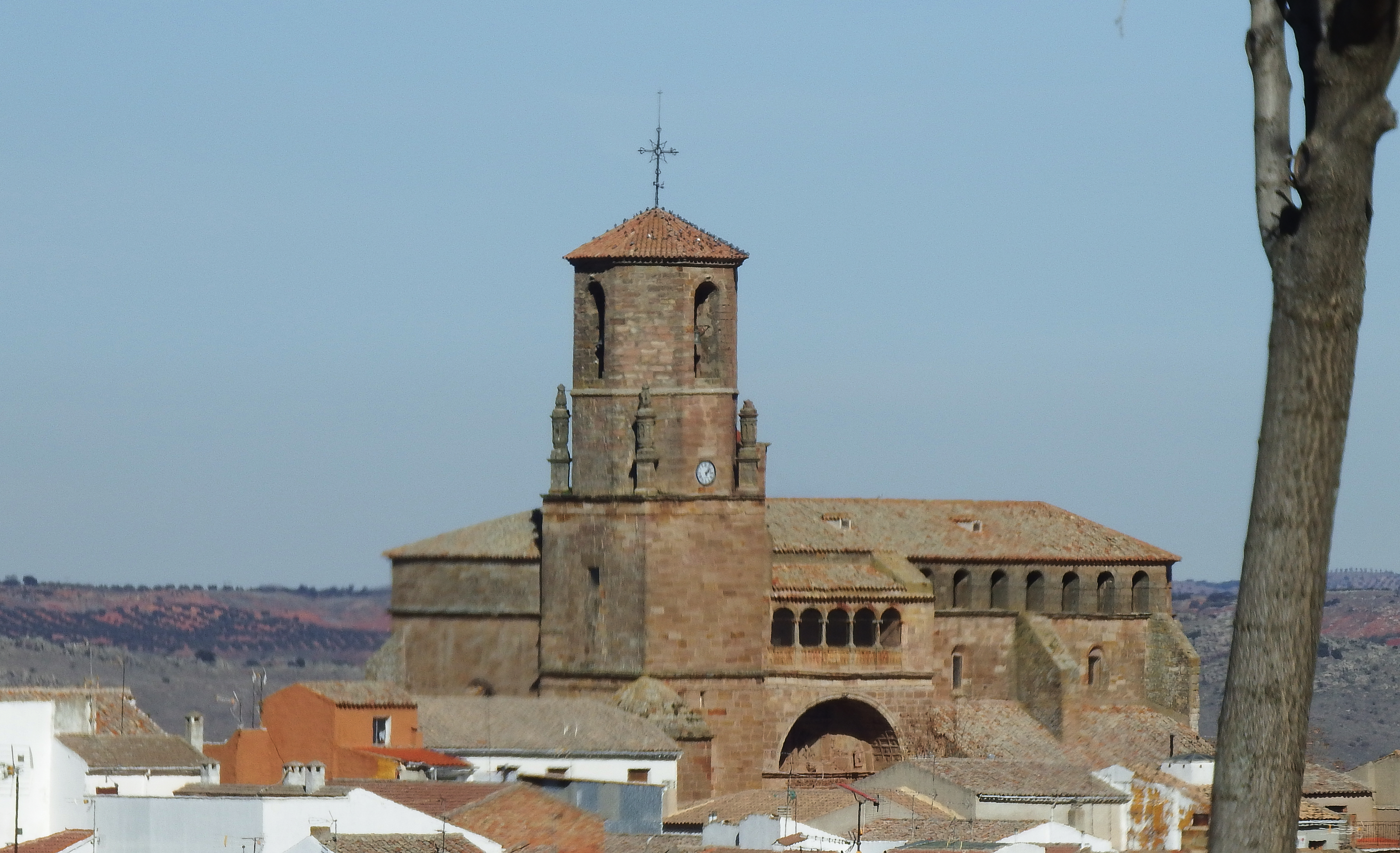 Villamanrique